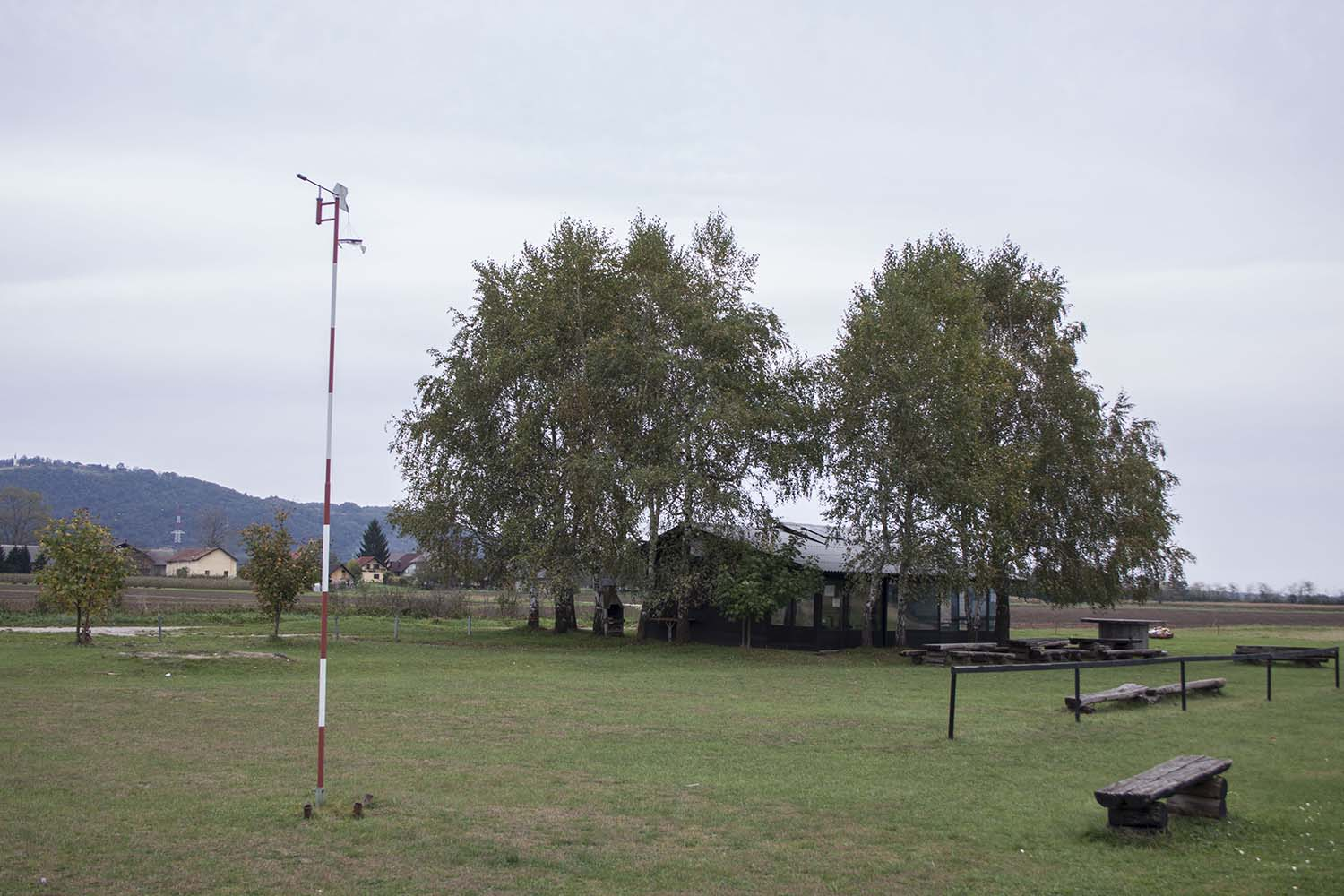 Assemble model airport